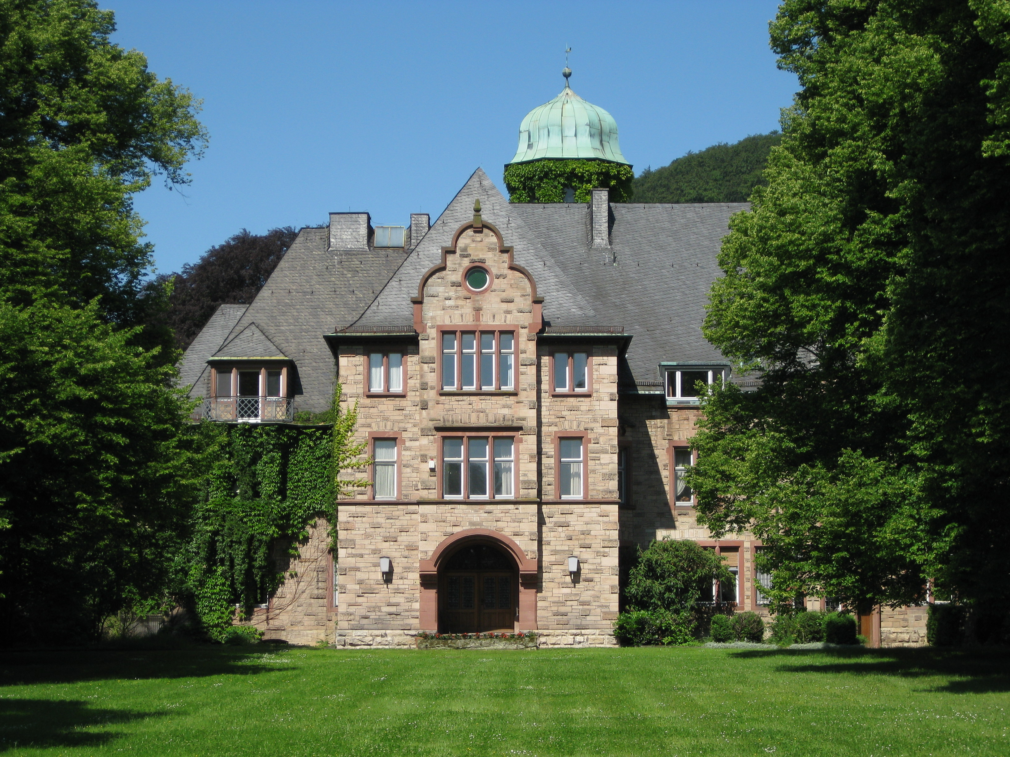 Gutshaus Hohenhaus in Holzhausen bei Herleshausen in Hessen